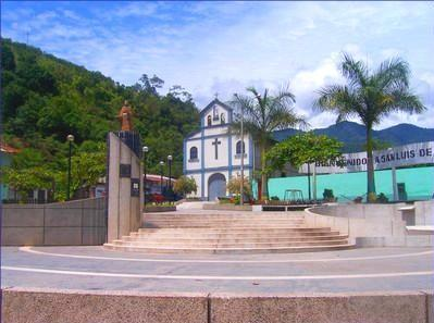 San luis